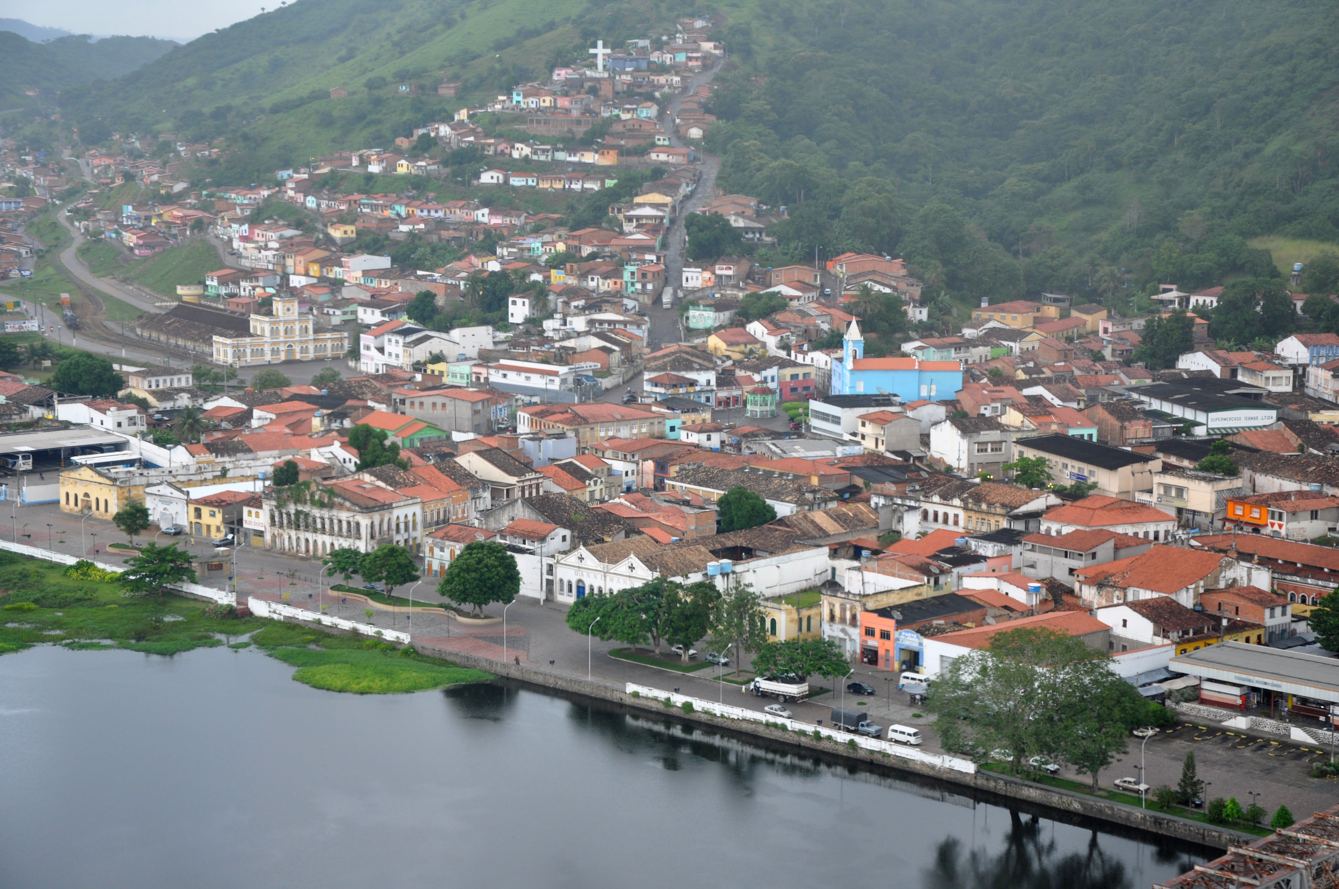 Vista áerea frontal da cidade de São Félix (Bahia)